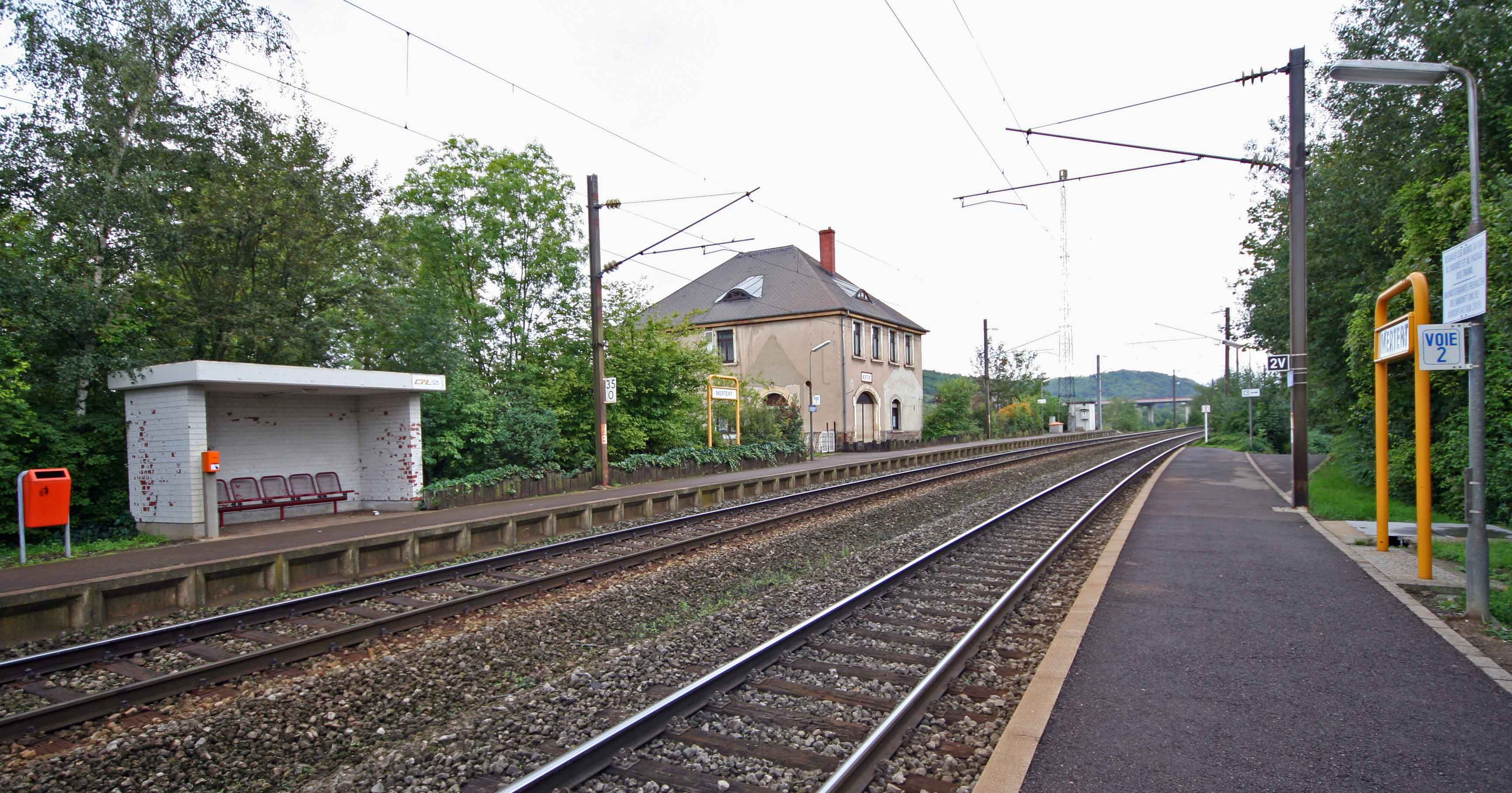 Sujet:D'Gare Mäertert Source:Fotograf User:Cornischong